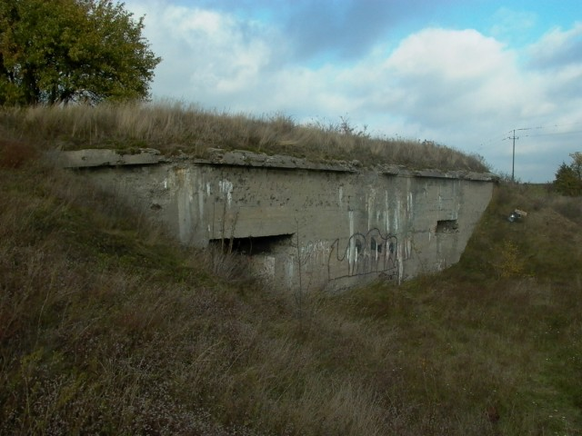 Zdjęcie przedstawia jedno z wejść do Fortu XIV Twierdzy Modlin. Autor: Zbigniew Strucki .